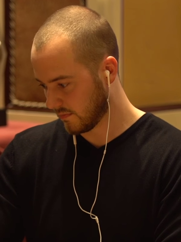 Sean Winter beim WPT Bellagio High Roller